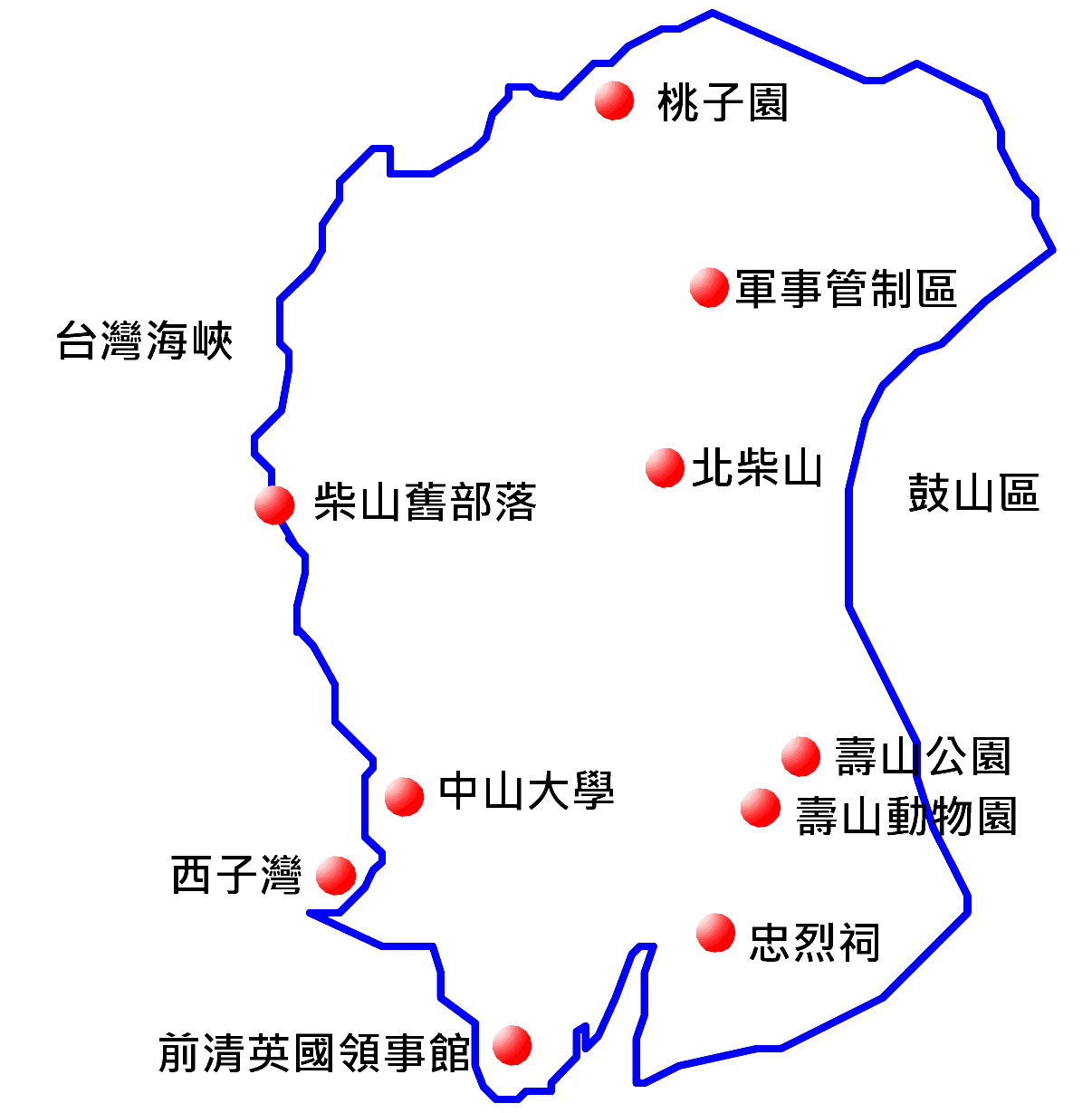 Kaohsiung Tzaishan Park